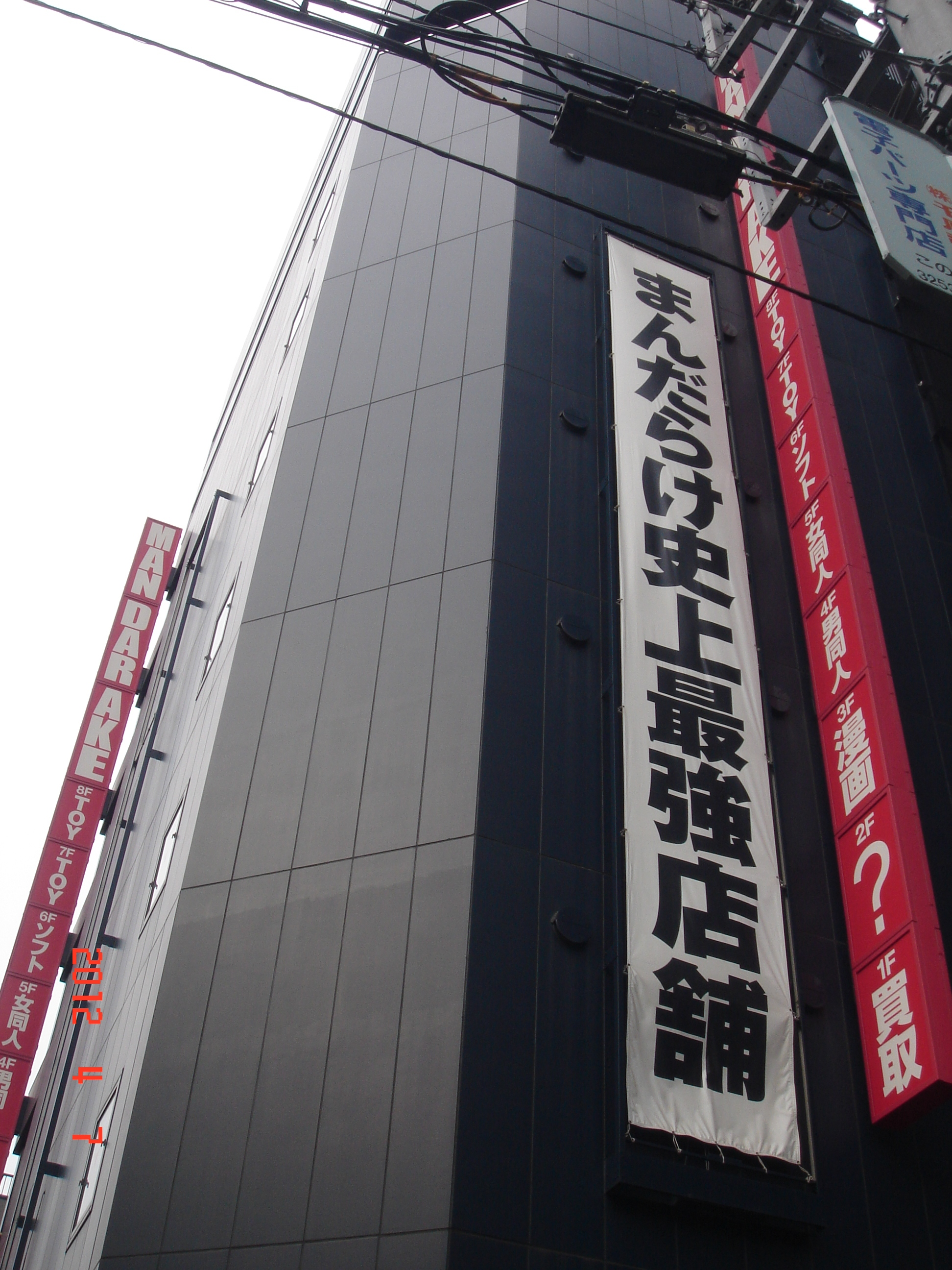 秋葉原のまんだらけコンプレックス。8F建ての古本屋。